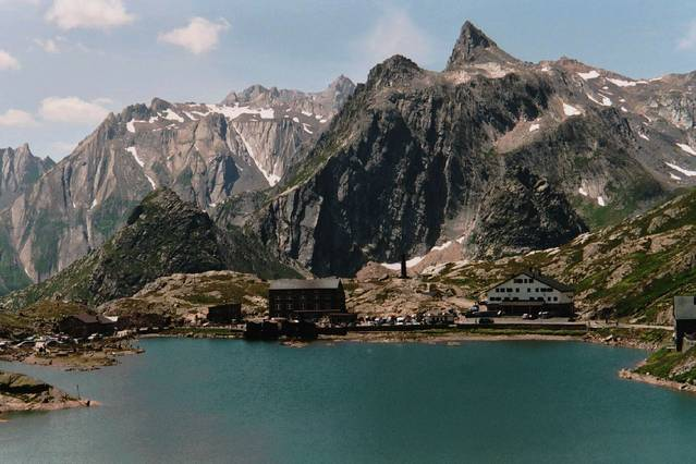 Lac du Col du Grand-Saint-Bernard